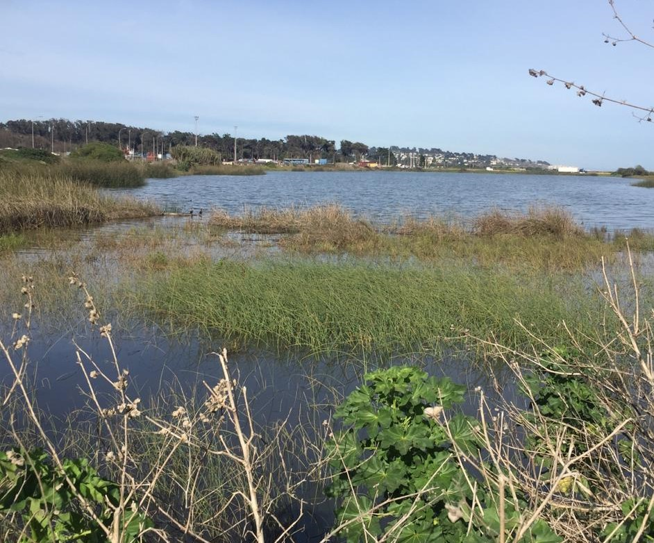 Humedal Laguna Llolleo, se refleja claramente que es un humedal urbano y entra bajo la cobertura de la Ley N°21.000 sobre protección de humedales urbanos.